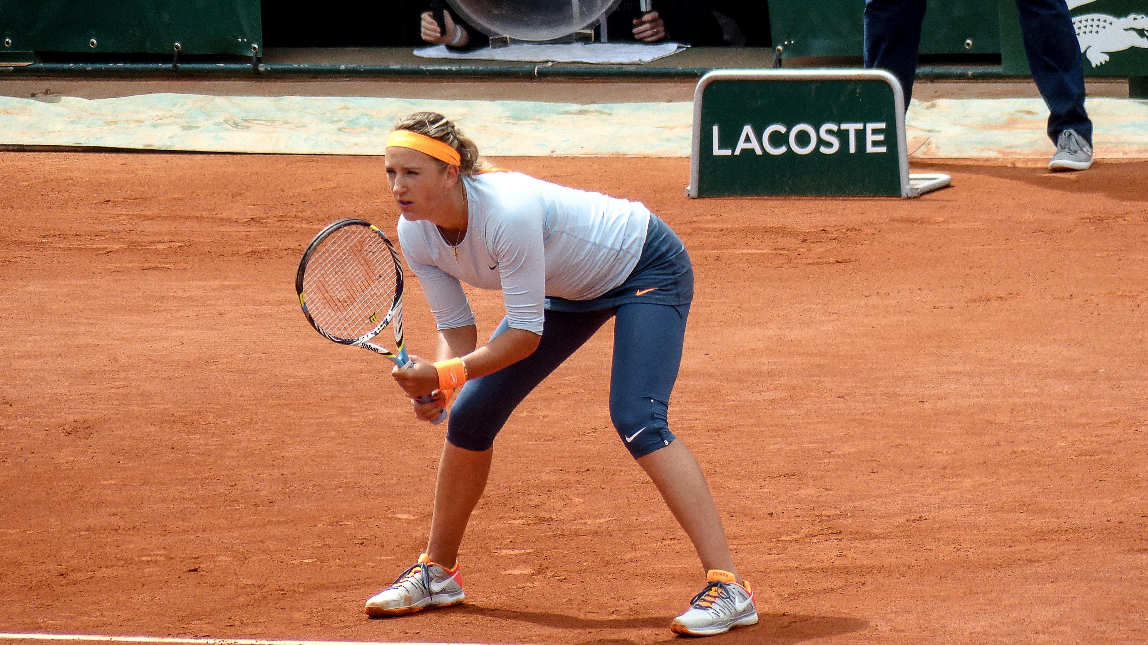 2ème tour Roland Garros 2013 : Victoria Azarenka (BLR) def. Elena Vesnina (RUS)